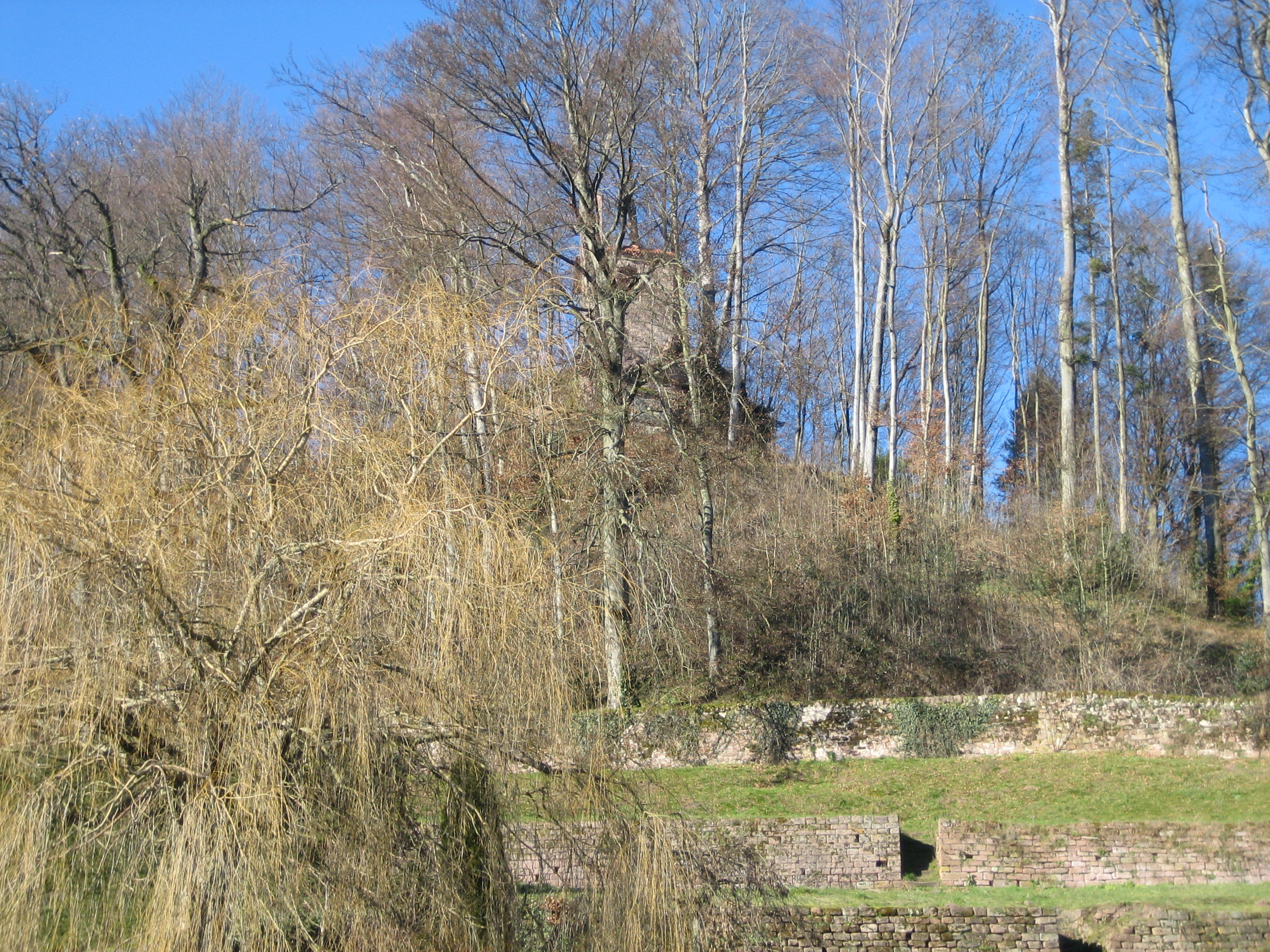 Vue des ruines du château de Bruyères (Vosges) depuis le square V. Doron par Raphaël Tassin (raphdvoj) le 4/2/2007